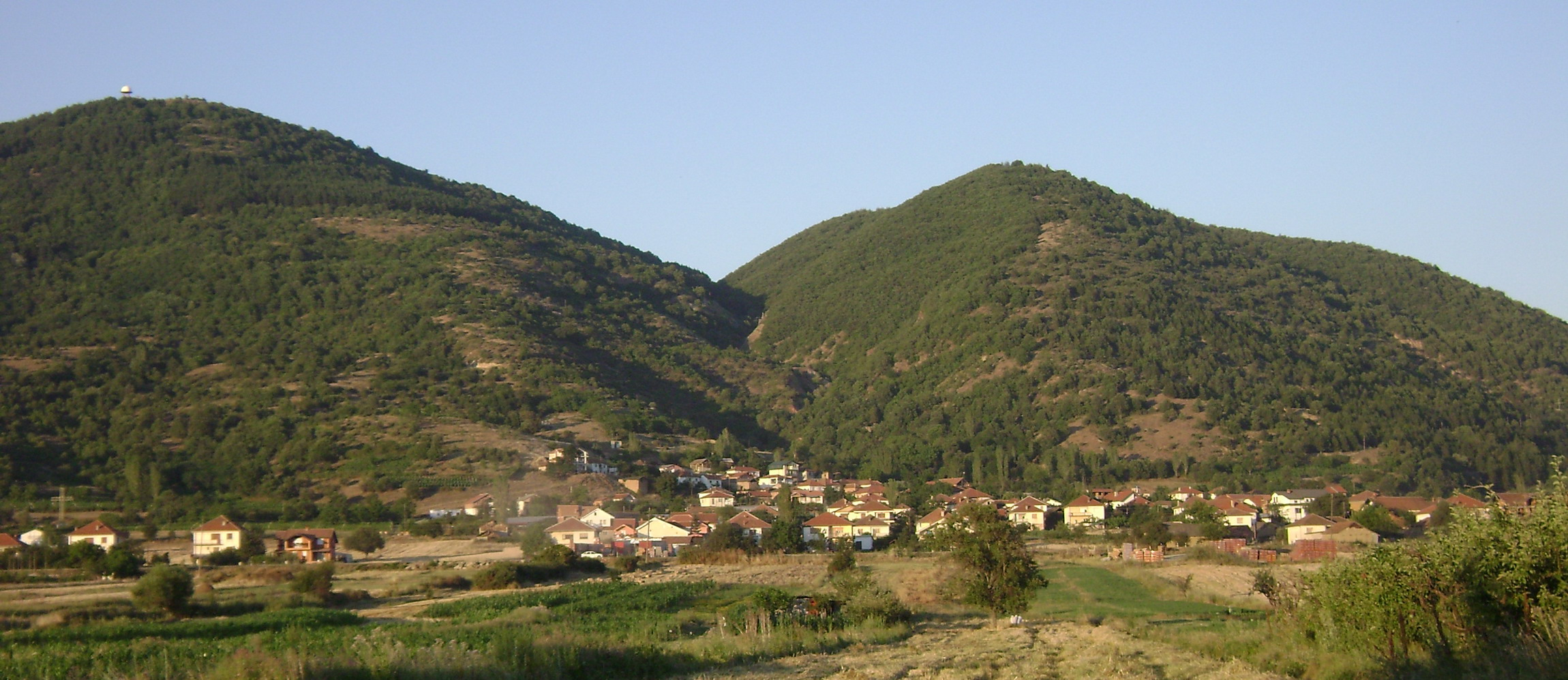 моја слика